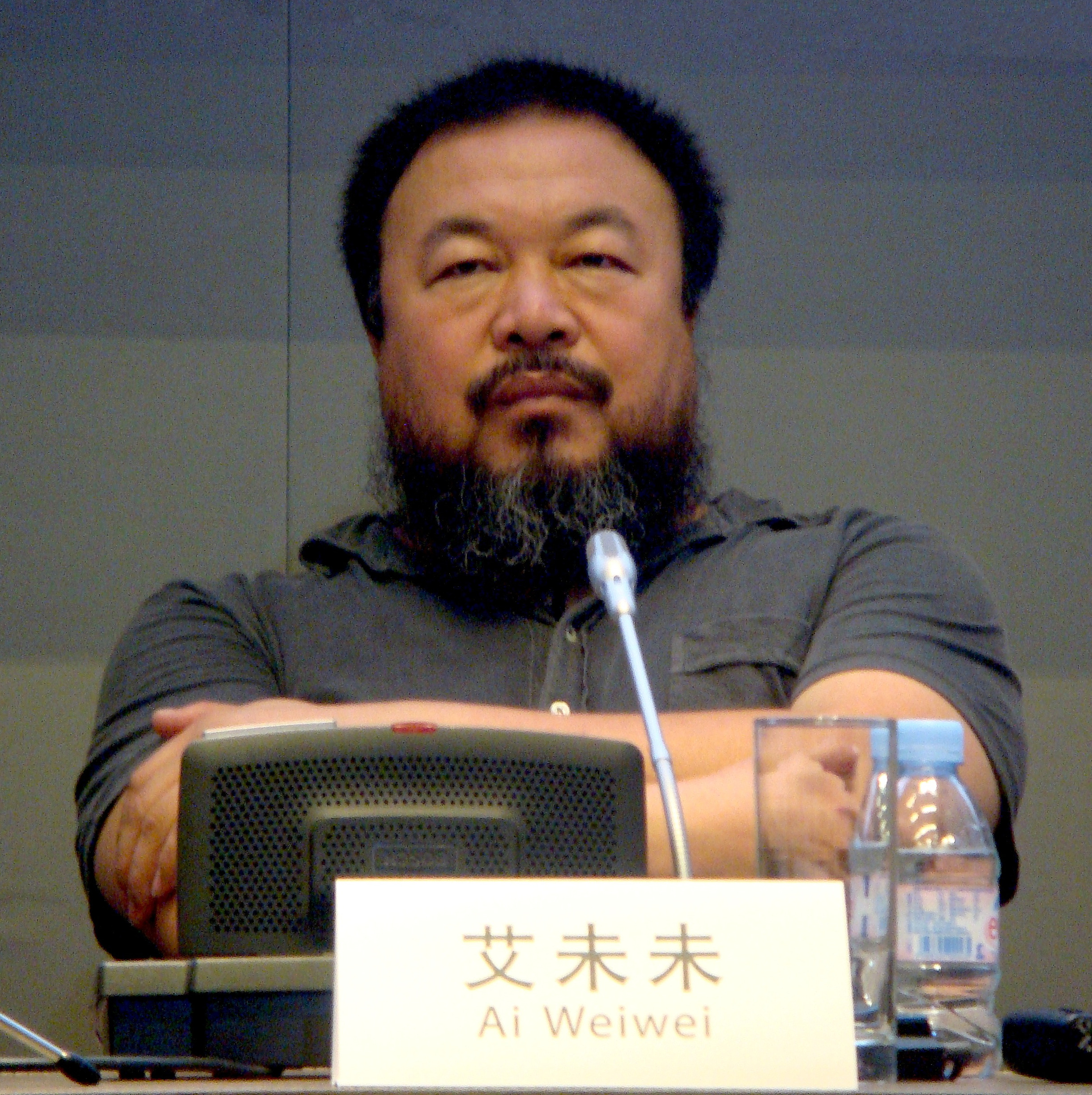 Ai Weiwei @ 798 Beijing